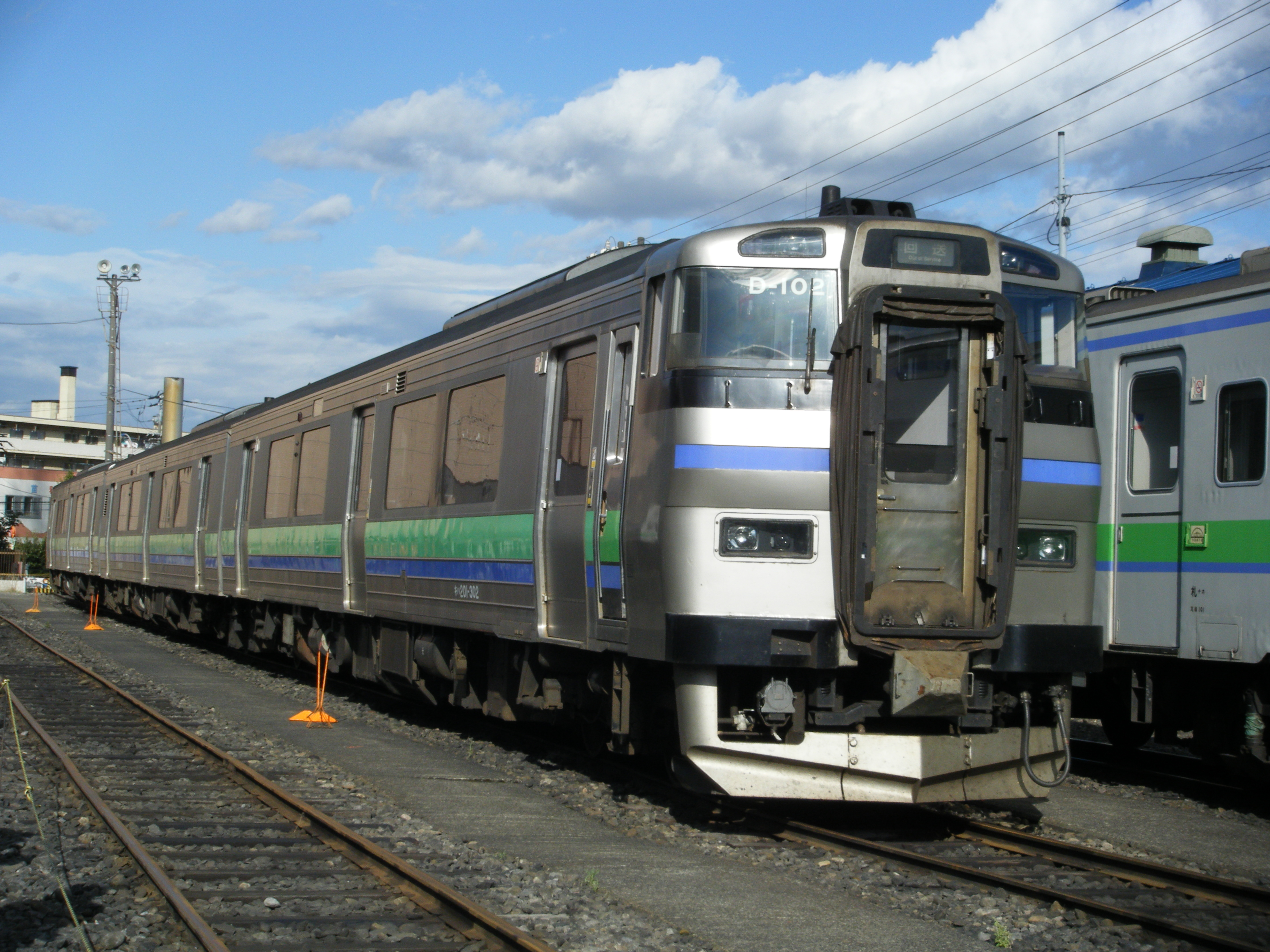 キハ201系気動車。JR北海道苗穂工場一般公開時にて撮影。